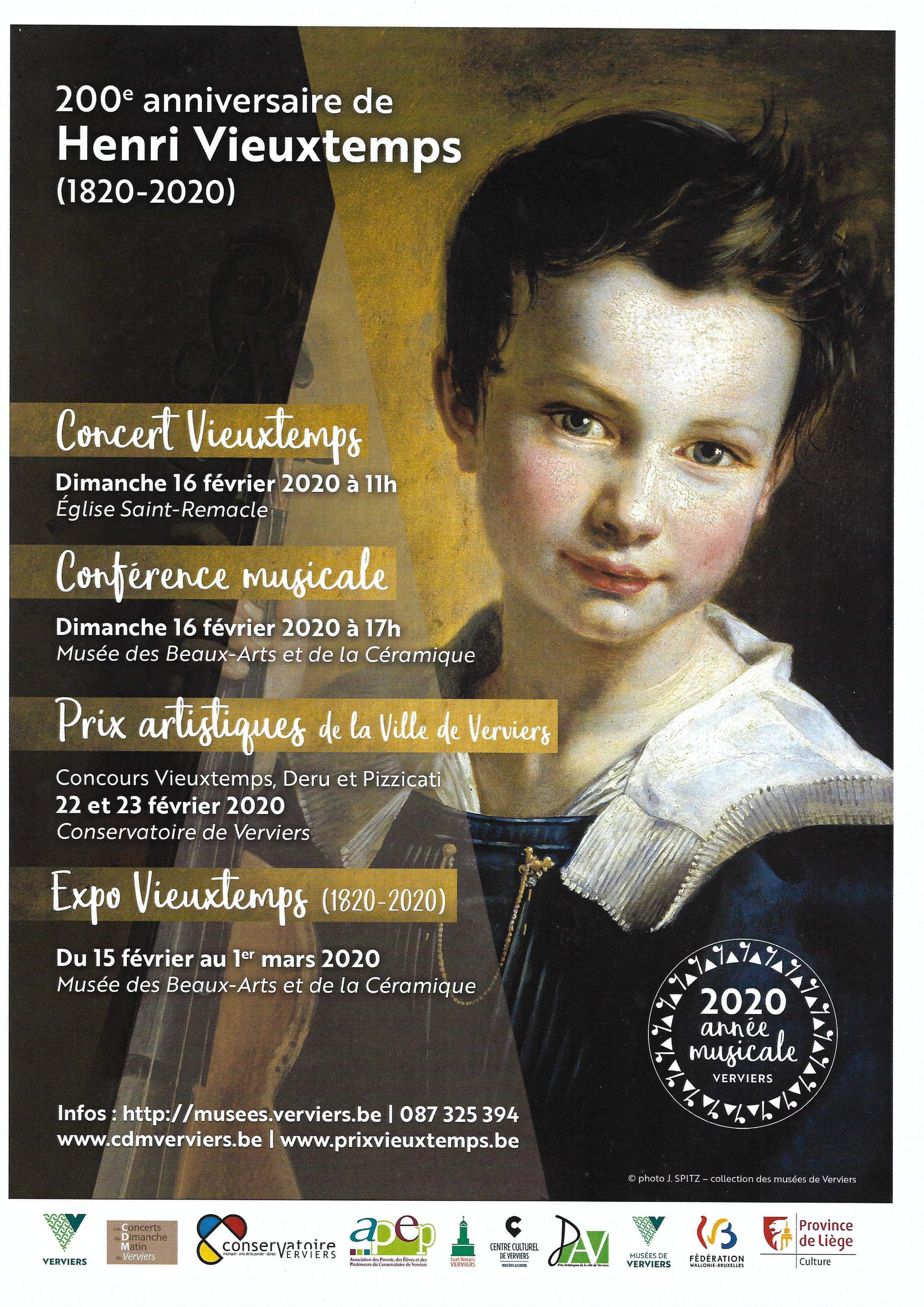 Bicentenaire de la naissance d'Henri Vieuxtemps à Verviers 2020. Manifestations culturelles organisées